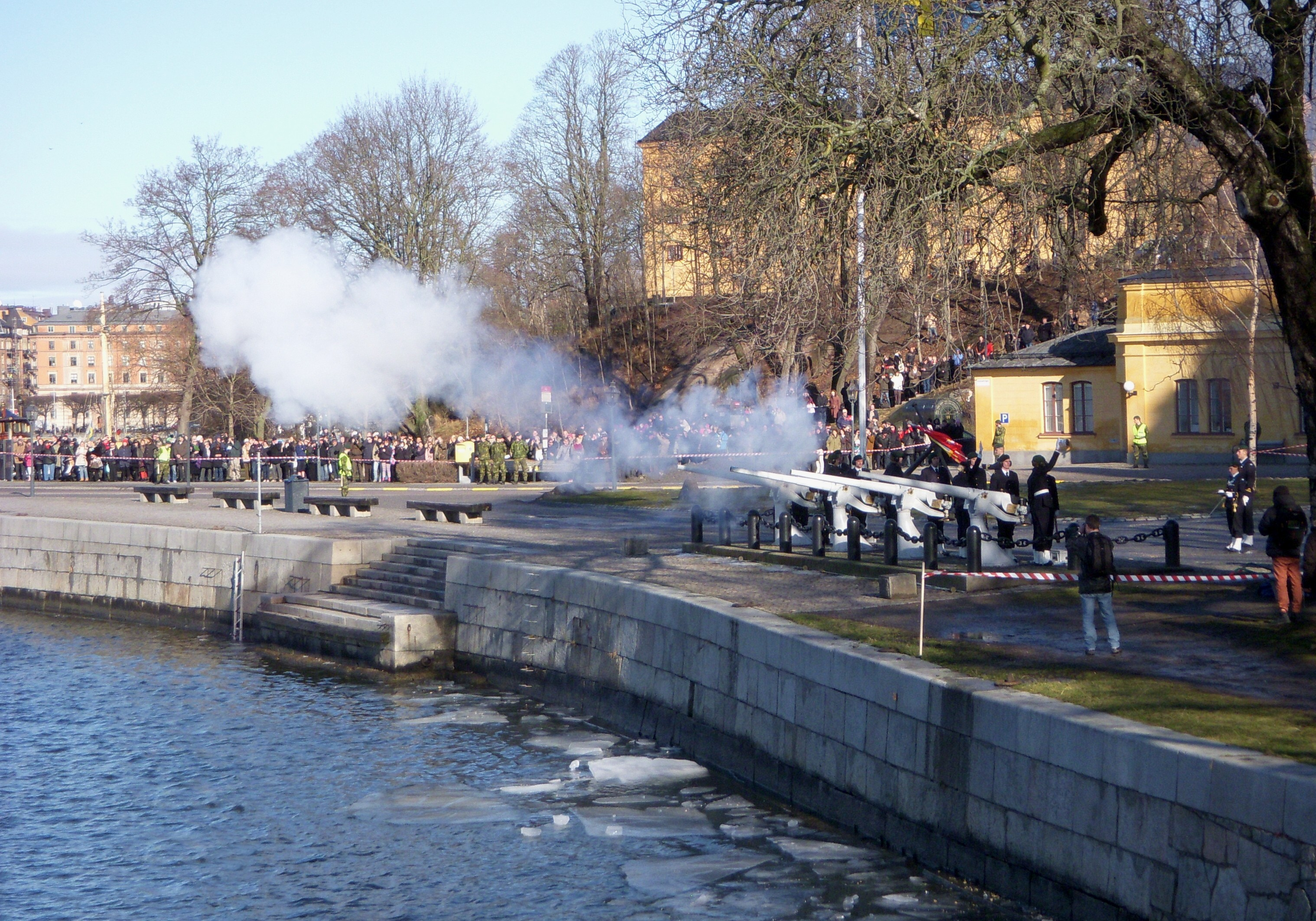 Salut från Skeppsholmen, Prinsessan Estelle är född